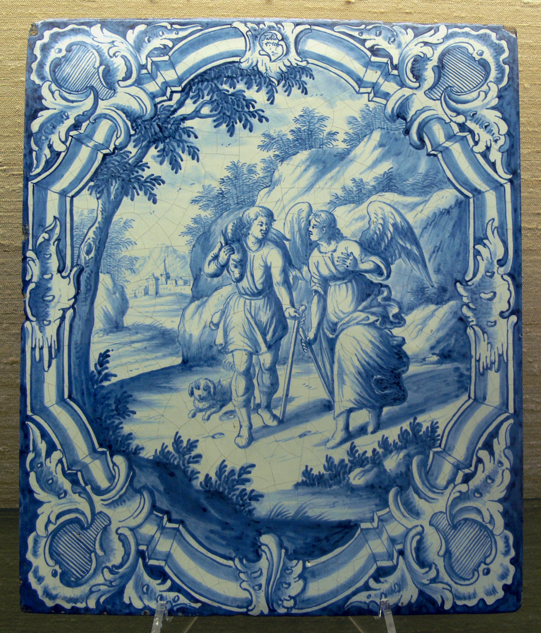 Ofenkachel mit Blaumalerei, Motiv: Tobias mit dem Fisch und der Engel; Hamburg, 2. Viertel 18. Jh. Kunstgewerbemuseum Berlin, Inv. Nr. 1988,133